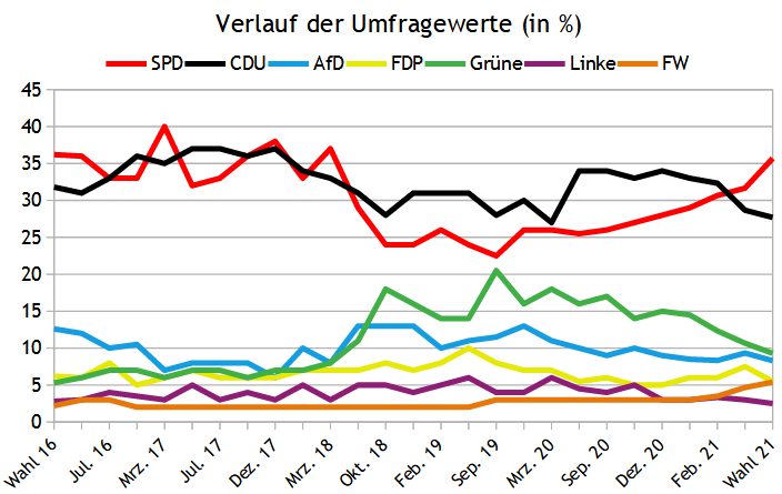 Umfragen zur Lantagswahl 2021 in Rheinland Pfalz